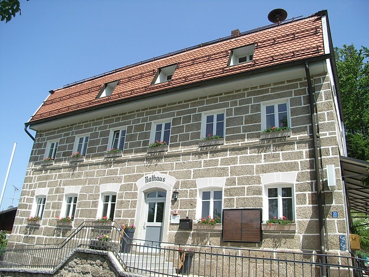 Das Rathaus der Gemeinde Saldenburg, Niederbayern